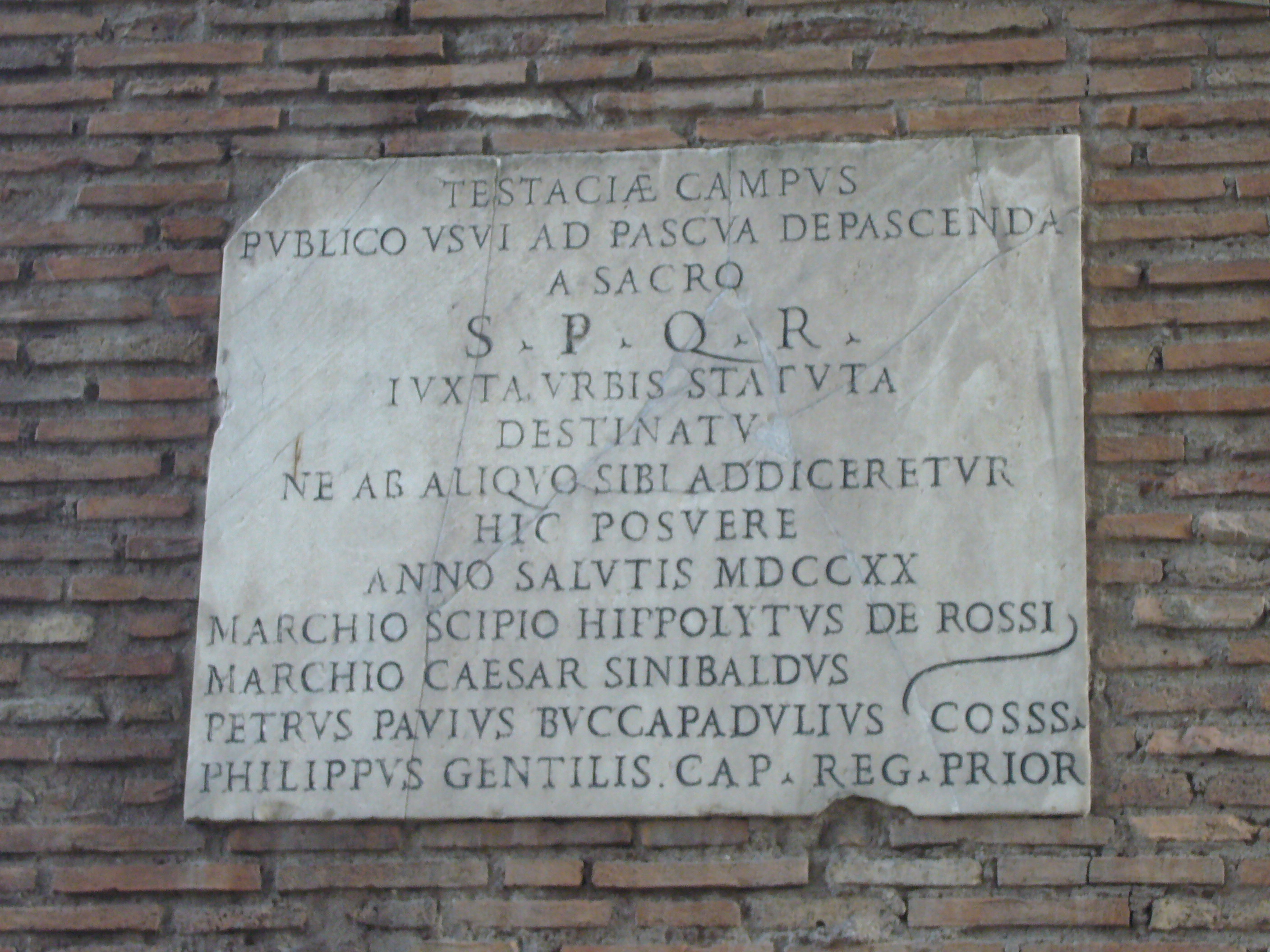 Roma, Porta San Paolo: lapide che riconosce l'uso pubblico dei prati di Testaccio, oggi sulle mura della Porta Ostiense (o Porta San Paolo). Il testo recita: "Affinché nessuno possa appropriarsi dei campi del Testaccio, destinati a pascolo per uso pubblico con sacro editto del Senato e del Popolo Romano secondo gli statuti della città, posero [questa lapide] nell'anno 1720 i consoli marchese Scipione Ippolito de Rossi, marchese Cesare Sinibaldi, Pierpaolo Boccapaduli e Filippo Gentili capitano del rione"